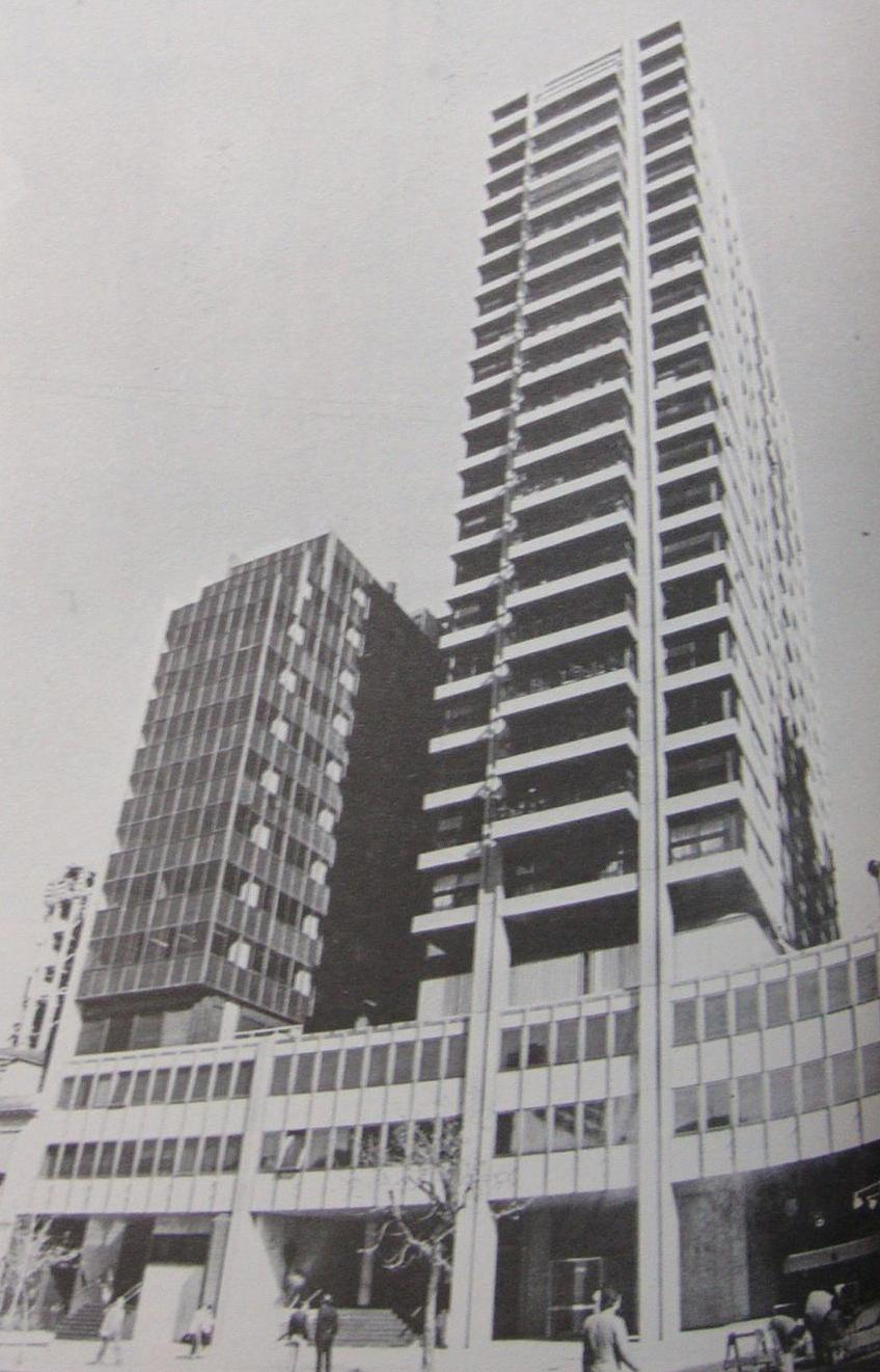 Torre Vicealmirante Repetto y edificio de oficinas (Gassó, Meyer & Rivarola, 1971), en Avenida Córdoba 1682. Construidos para la Sociedad Militar Seguros de Vida. Buenos Aires, Argentina.